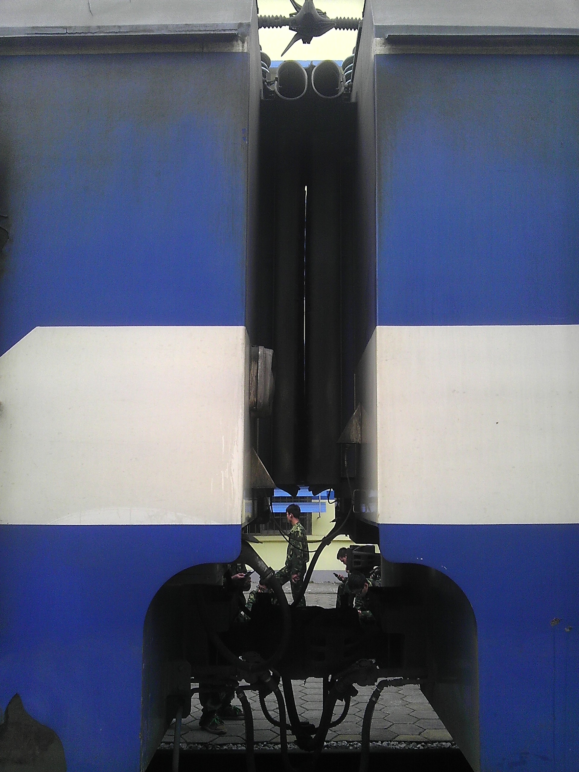 SS3B 5041 两节机车的连接处